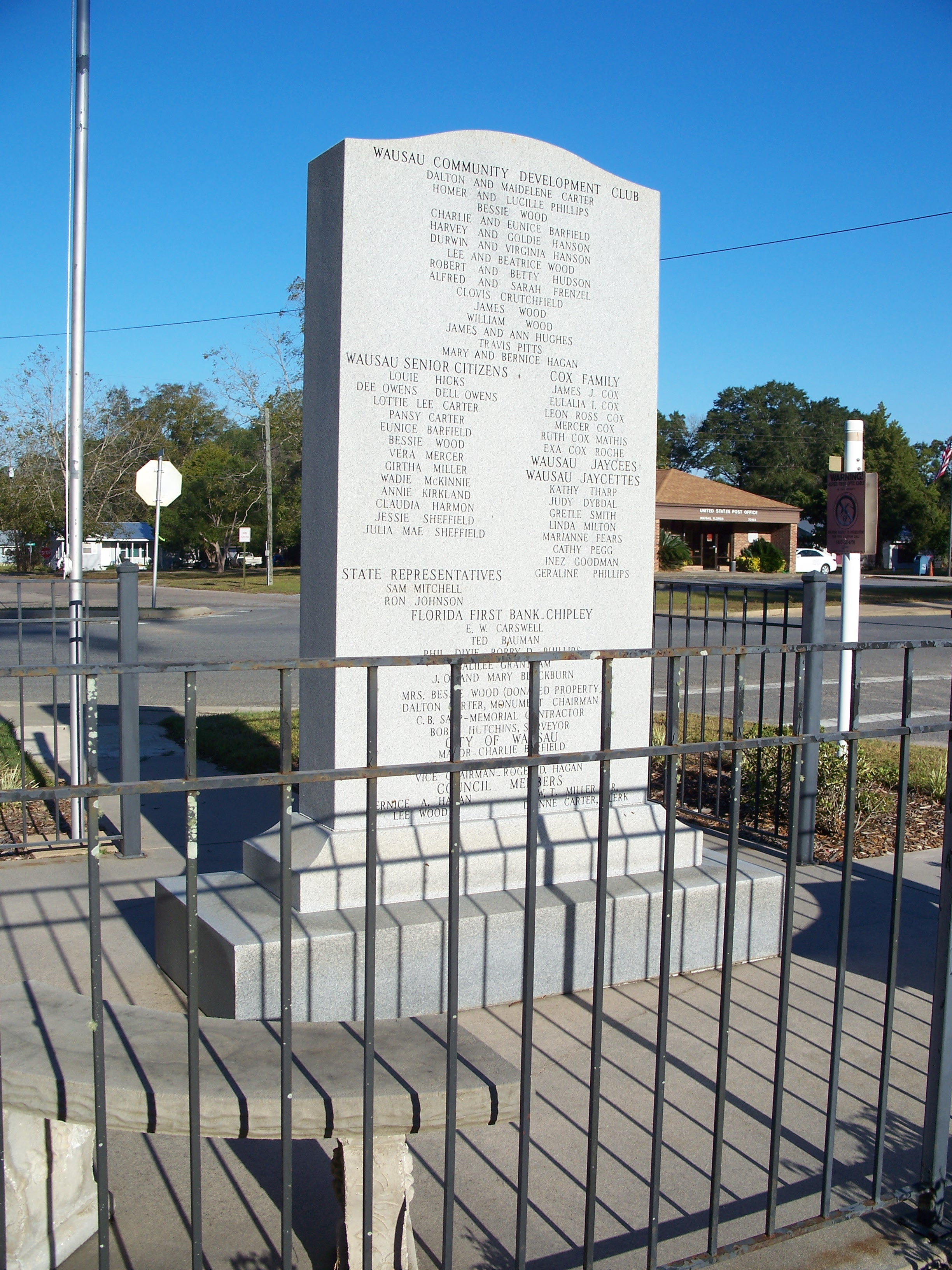 Wausau, Florida: Possum monument